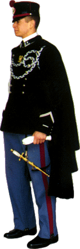 foto di allievo della scuola militare di milano